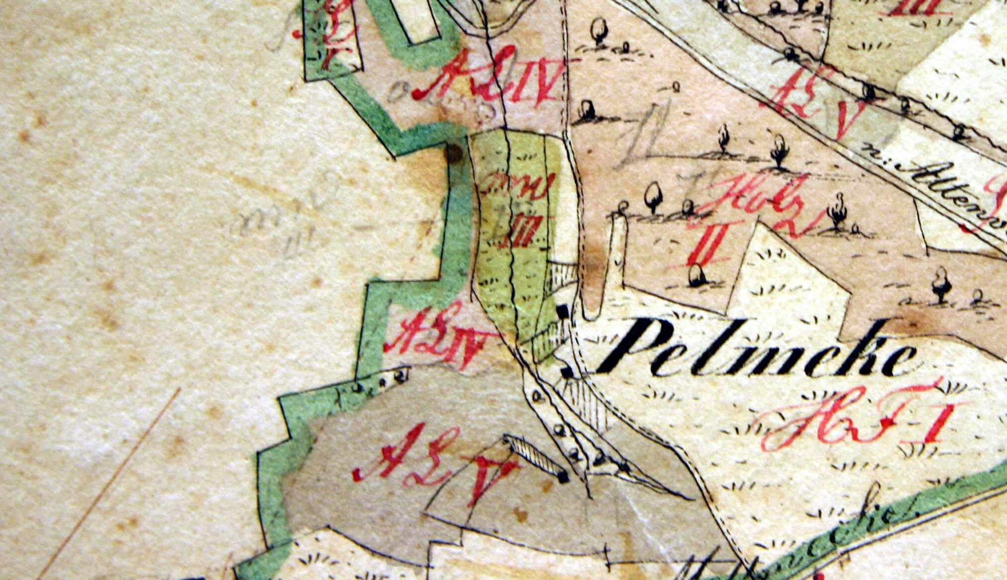 Pelmecke heute Permecke, Steuergemeinde Oedingen